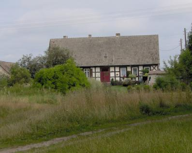 Budownictwo mieszkalne typu ryglowego w Marszewie. Autor: Maks Saczywko (Soczewa)